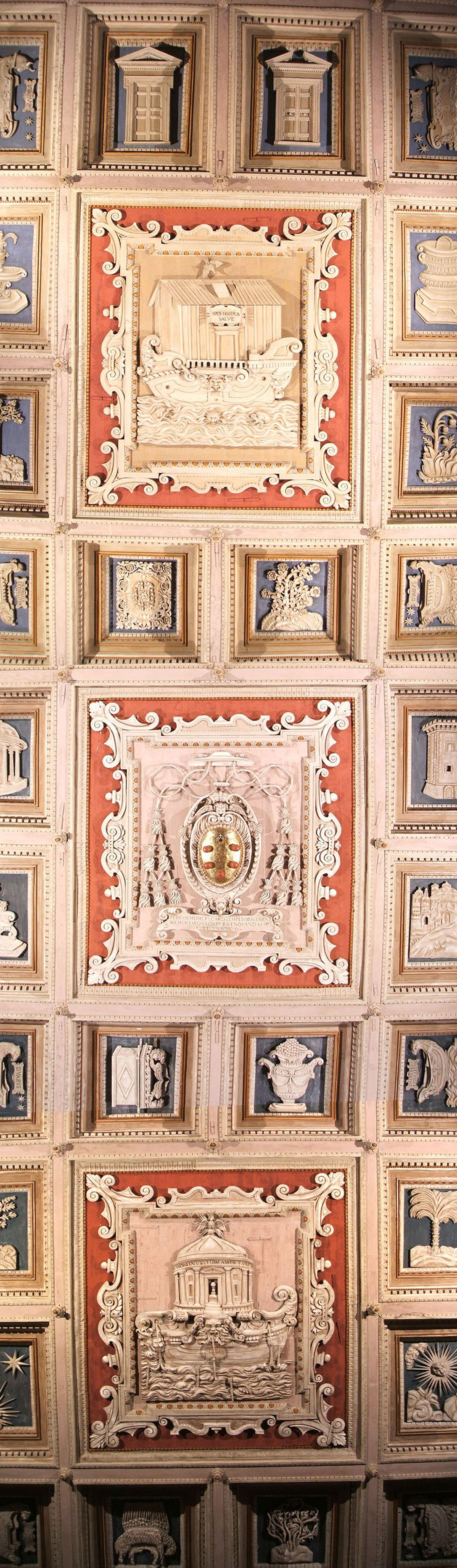 Soffitto di S. Maria in Domnica, Roma